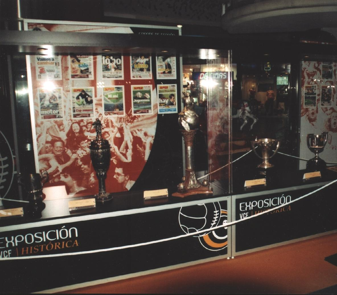 Trofeos Valencia CF